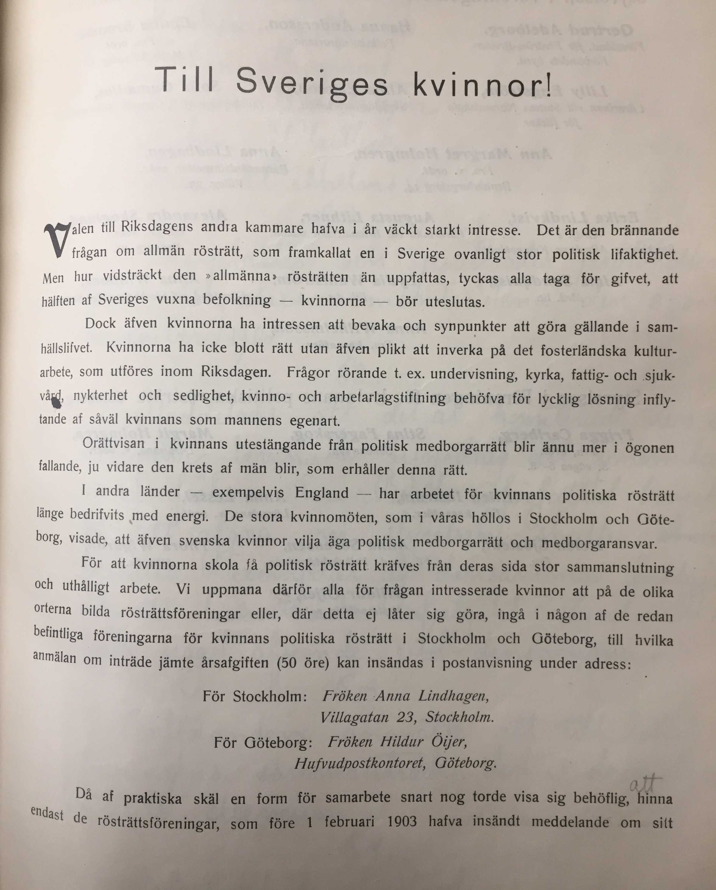 Annons i tidning utgiven av föreningen för kvinnans politiska rösträtt i Stockholm